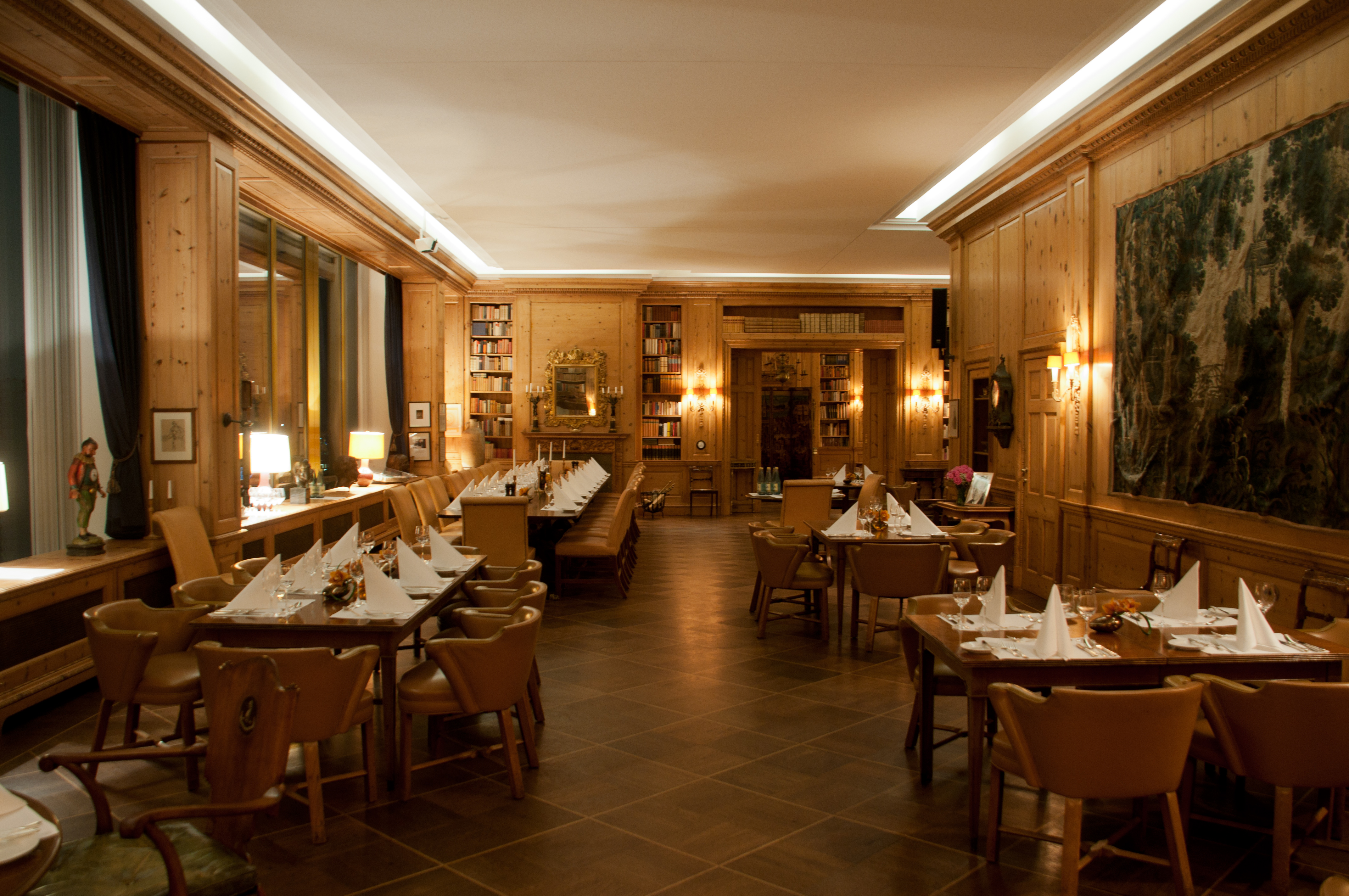 Wikipedia Stammtisch Berlin zu Besuch im Springer- Hochhaus